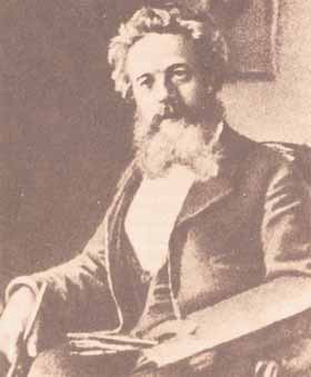 Апалінар Гараўскі